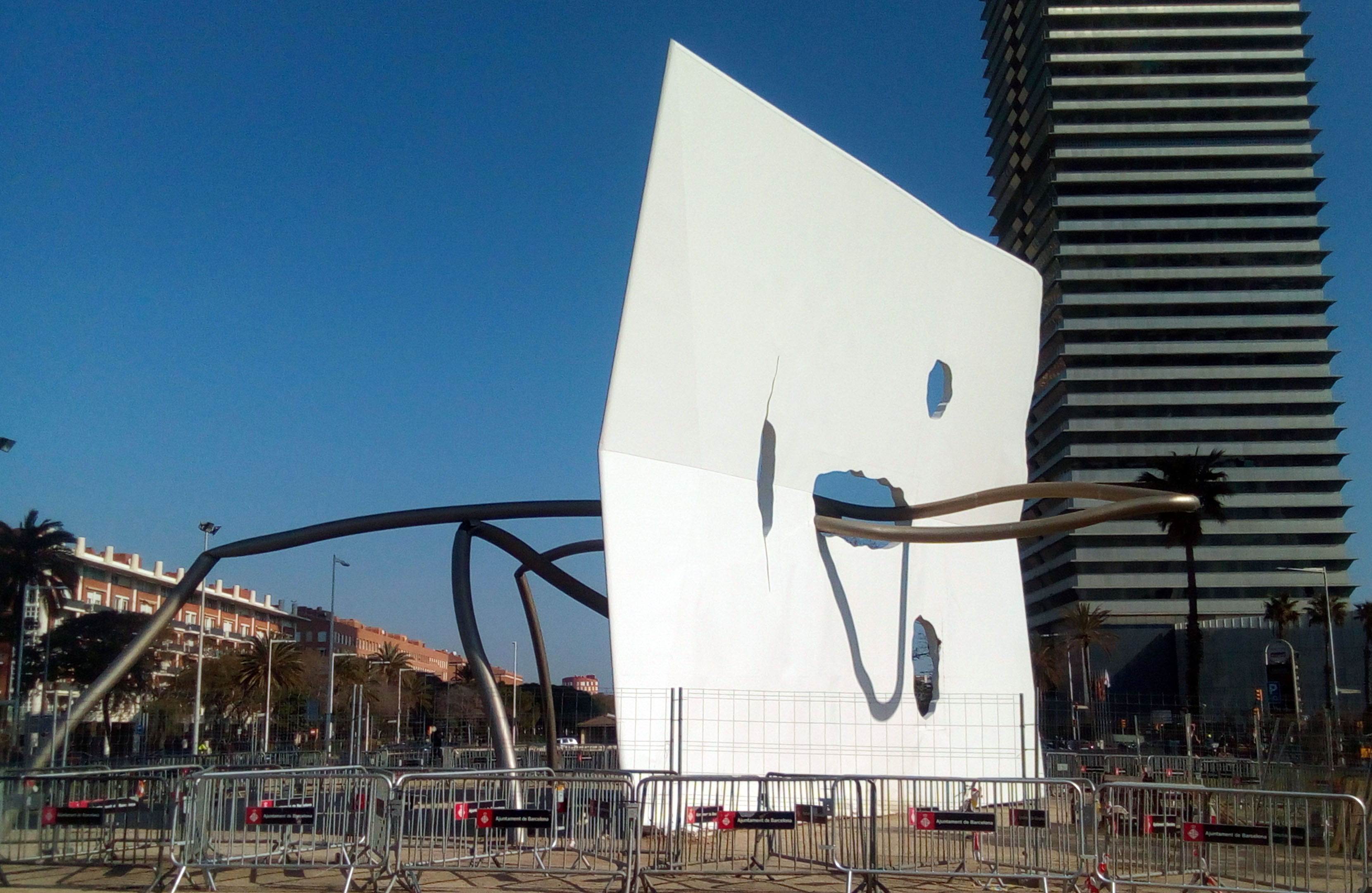 David y Goliat (Antoni Llena). La escultura caída en el suelo tras el paso del huracán Gloria (2020).